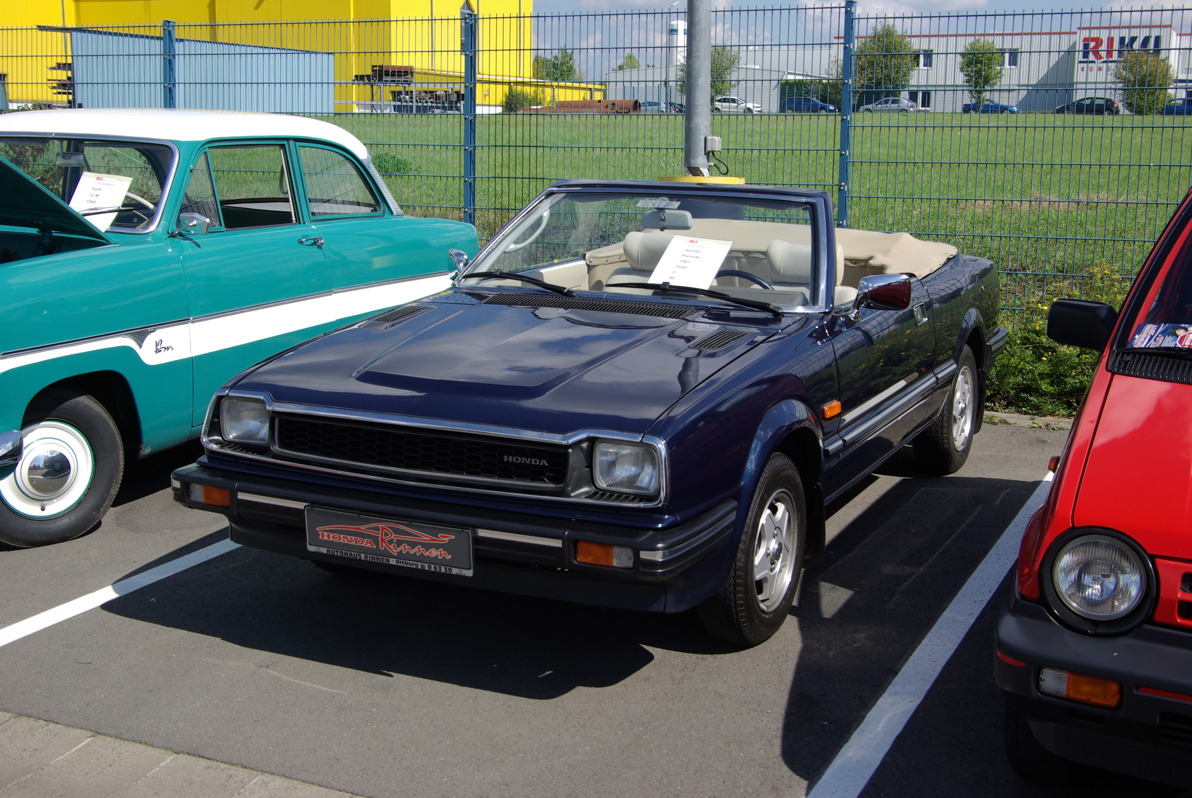 Honda Prelude, Baujahr 1981, 1600 cm³, 80 PS